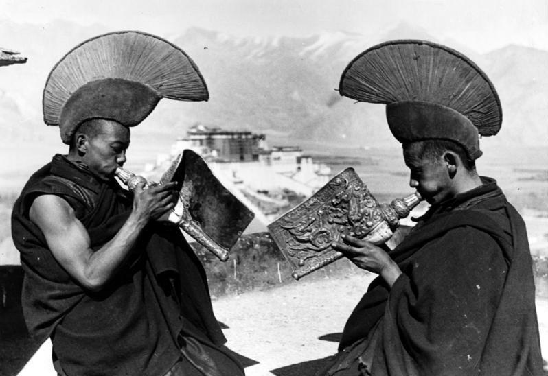 Lhasa, Lamas blasen Muscheltrompeten